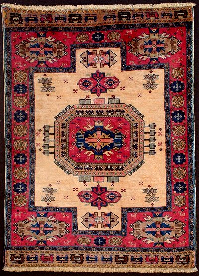 Deze foto van mijn eigen tapijt heb ik zelf gemaakt. Correspondentie over het gebruik van deze foto kunt u voeren via via mijn site: Arie M. den Toom Ridderkerk 10 januari 2006